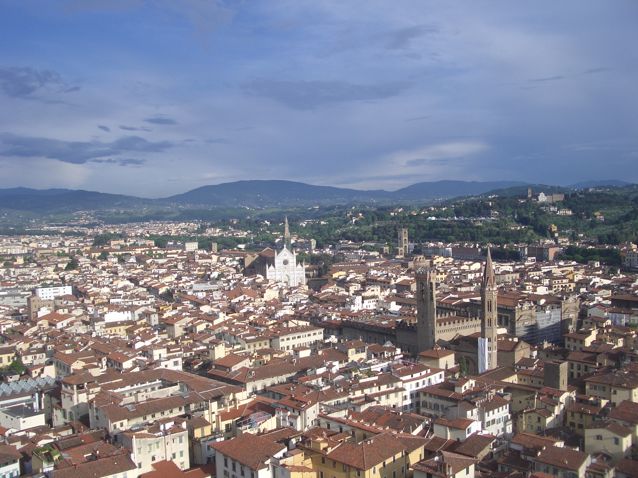 Vista de Florencia desde la torre del campanario del Duomo